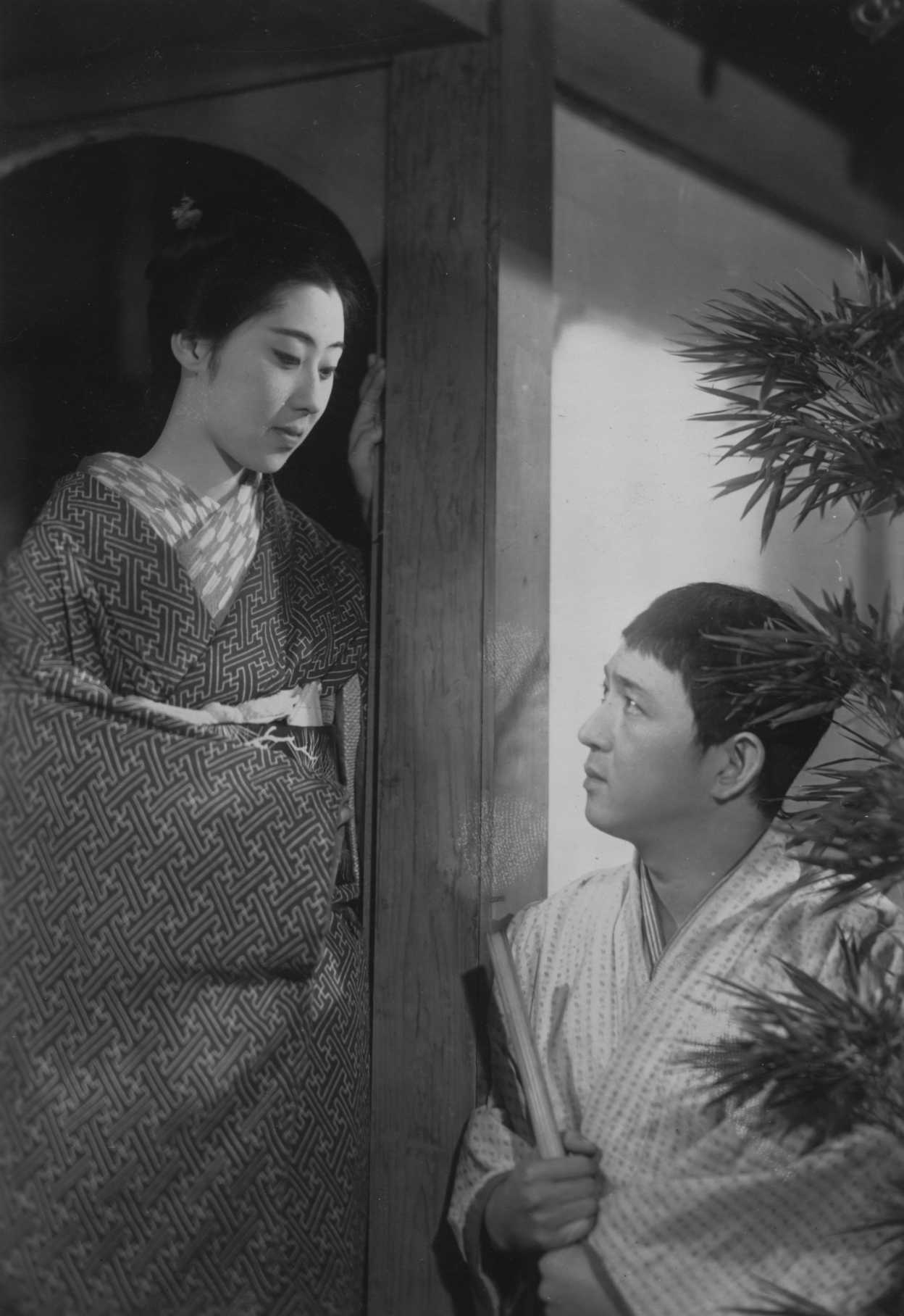 Orizuru Osen (折鶴お千)